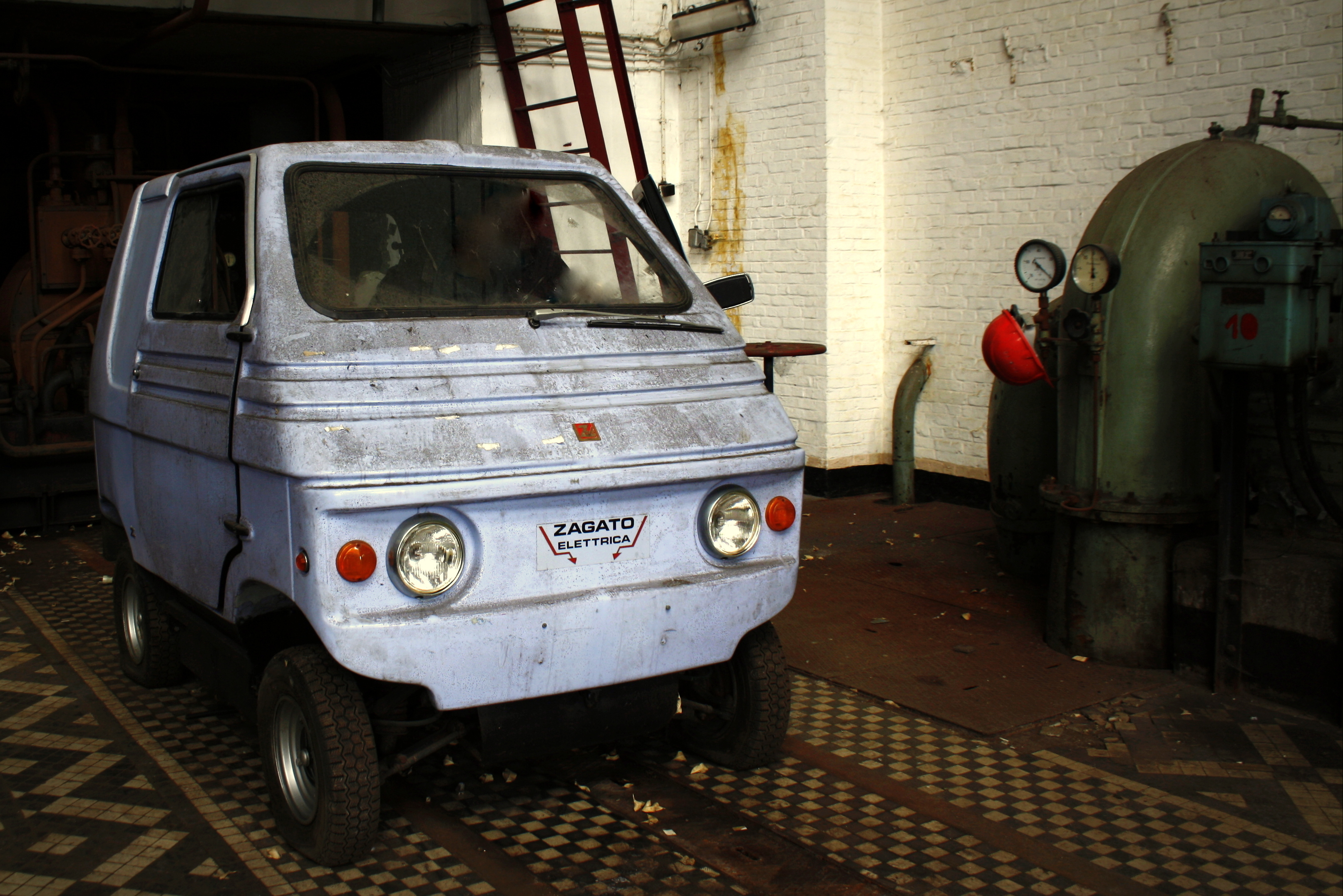 één van de 500 Zagato Zele's, verlaten in 'n voormalig museum.